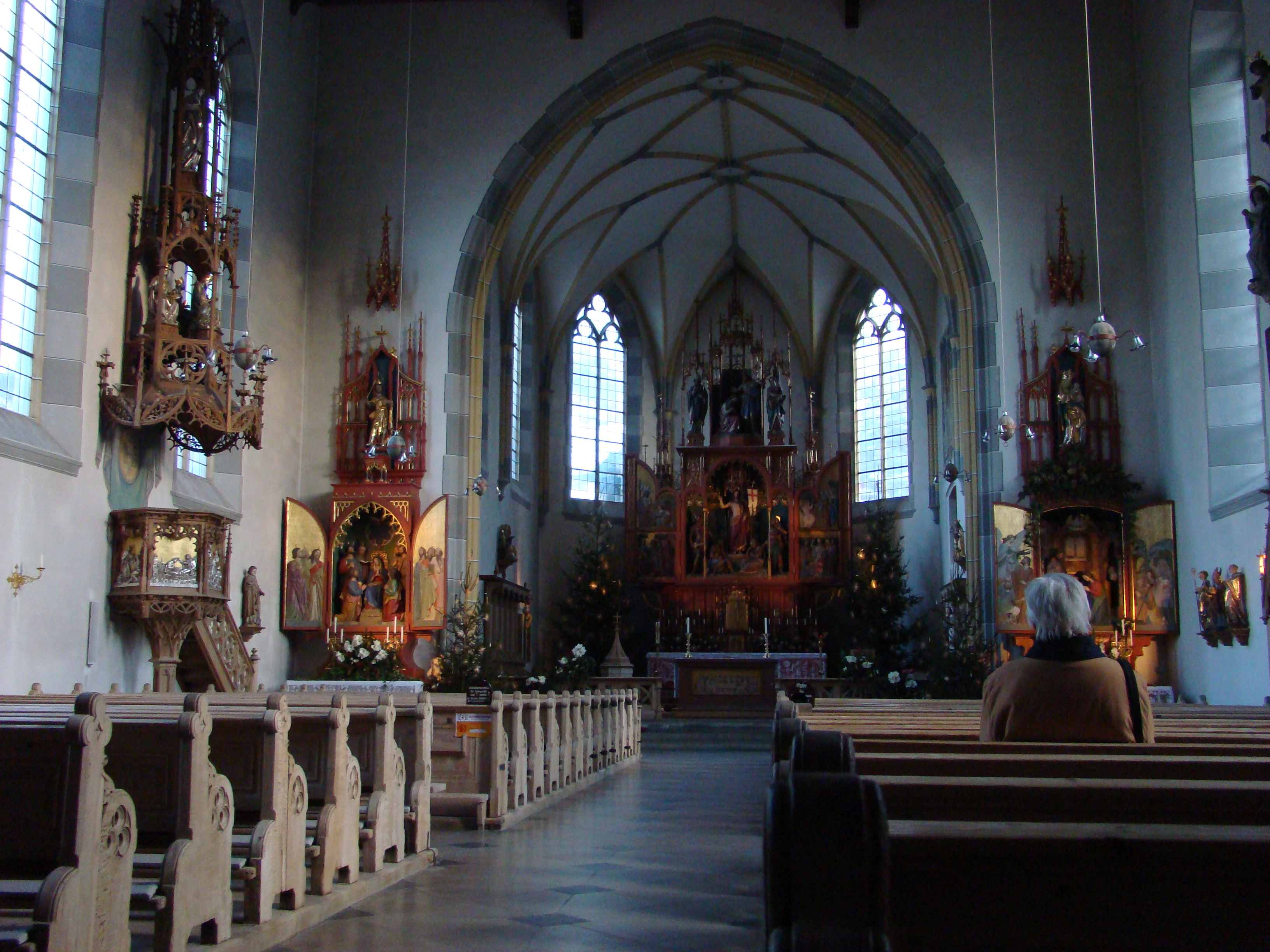 Im Innern der Pfarrkirche St. Johann in Oberstdorf (Allgäu)